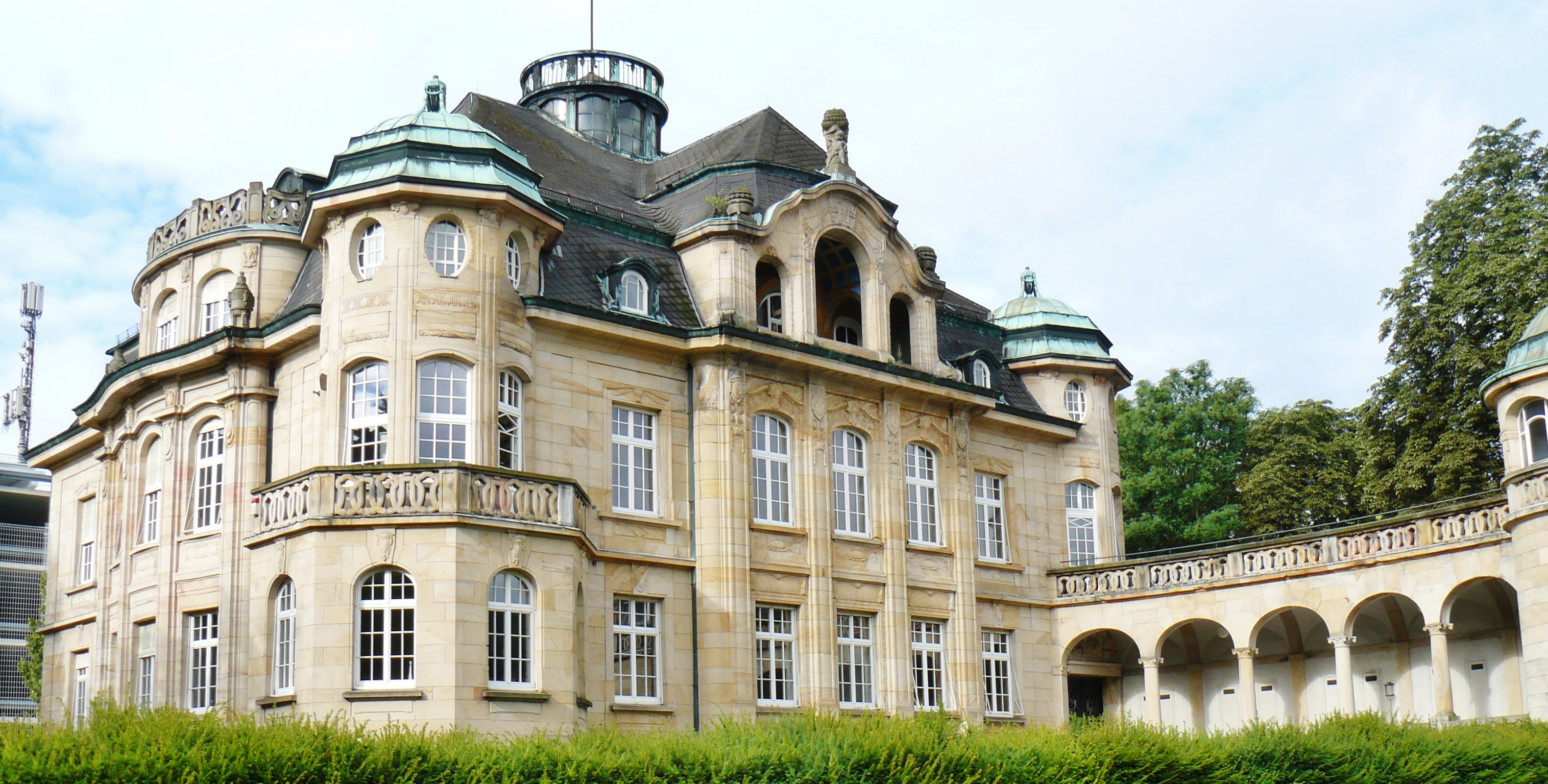 Haus in Albstadt